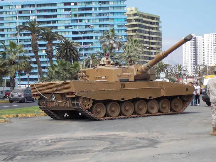 Carro de combate principal del ejército de Chile